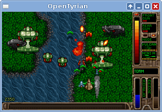 Tyrian graphic